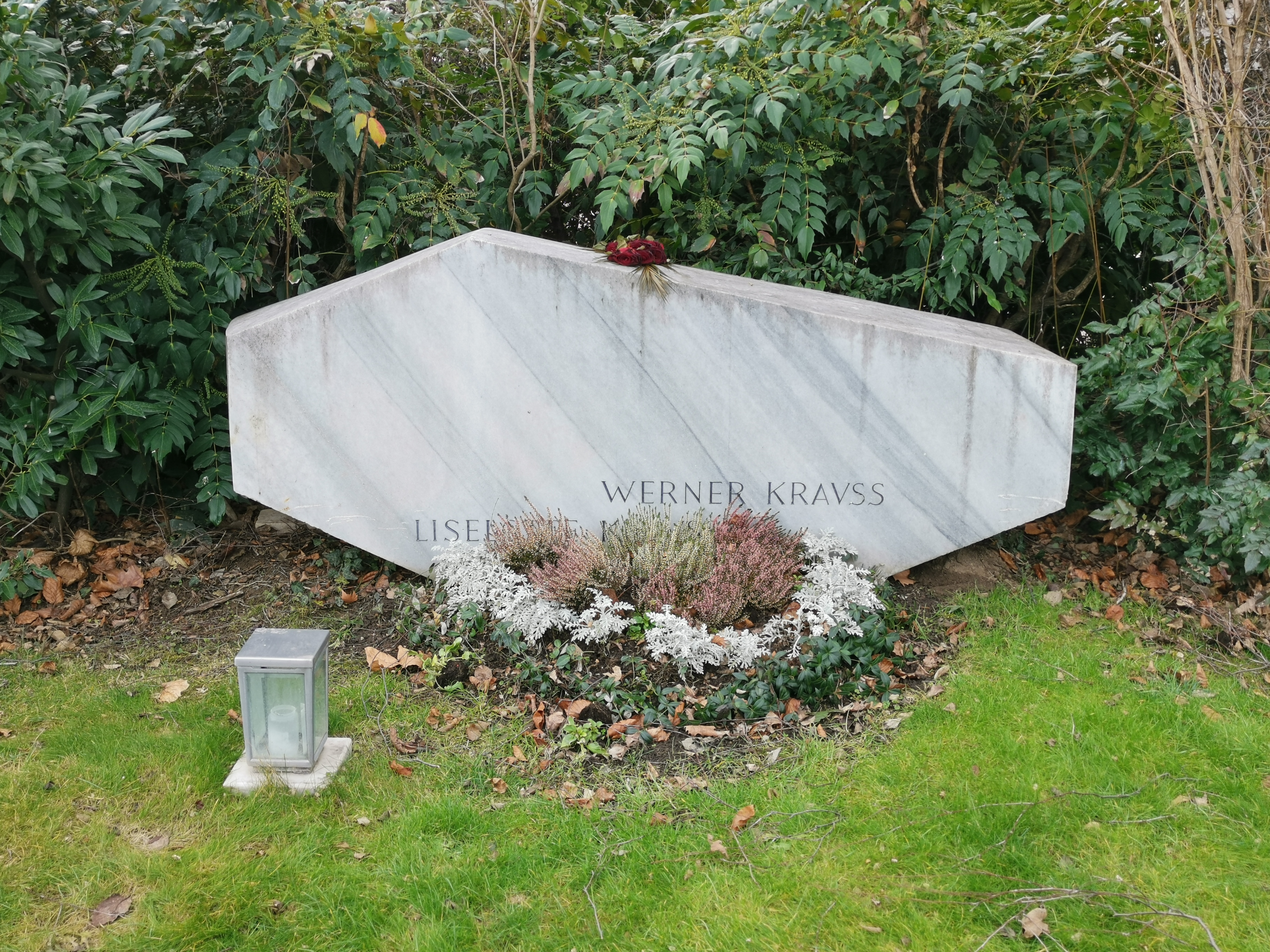 Grab des Schauspielers Werner Krauß auf dem Wiener Zentralfriedhof